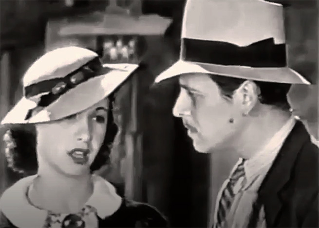 Carmen Molina y Carlos Villatoro. Clip de la película No te engañes (1937)